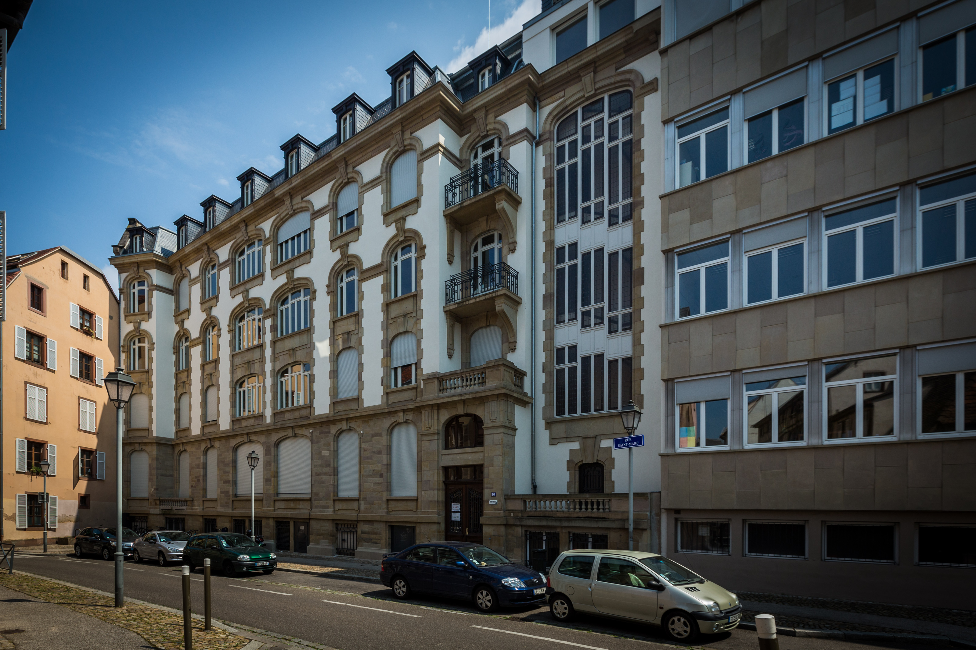 Le collège Lucie-Berger Strasbourg en juin 2015